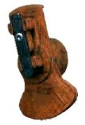 Rotor - Pieza del distribuidor del automotor.